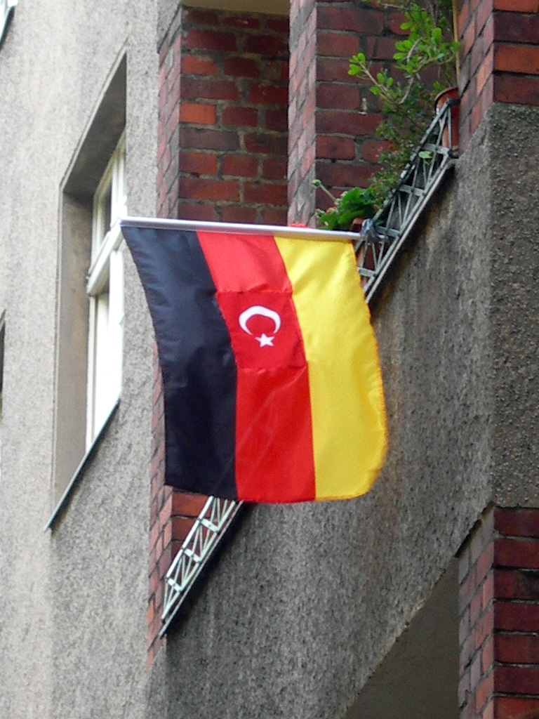 Selbstgemachte deutsch-türkische Fahne, gesehen im Sommer 2006 während der Fußballweltmeisterschaft in Berlin-Neukölln. Eigene Aufnahme